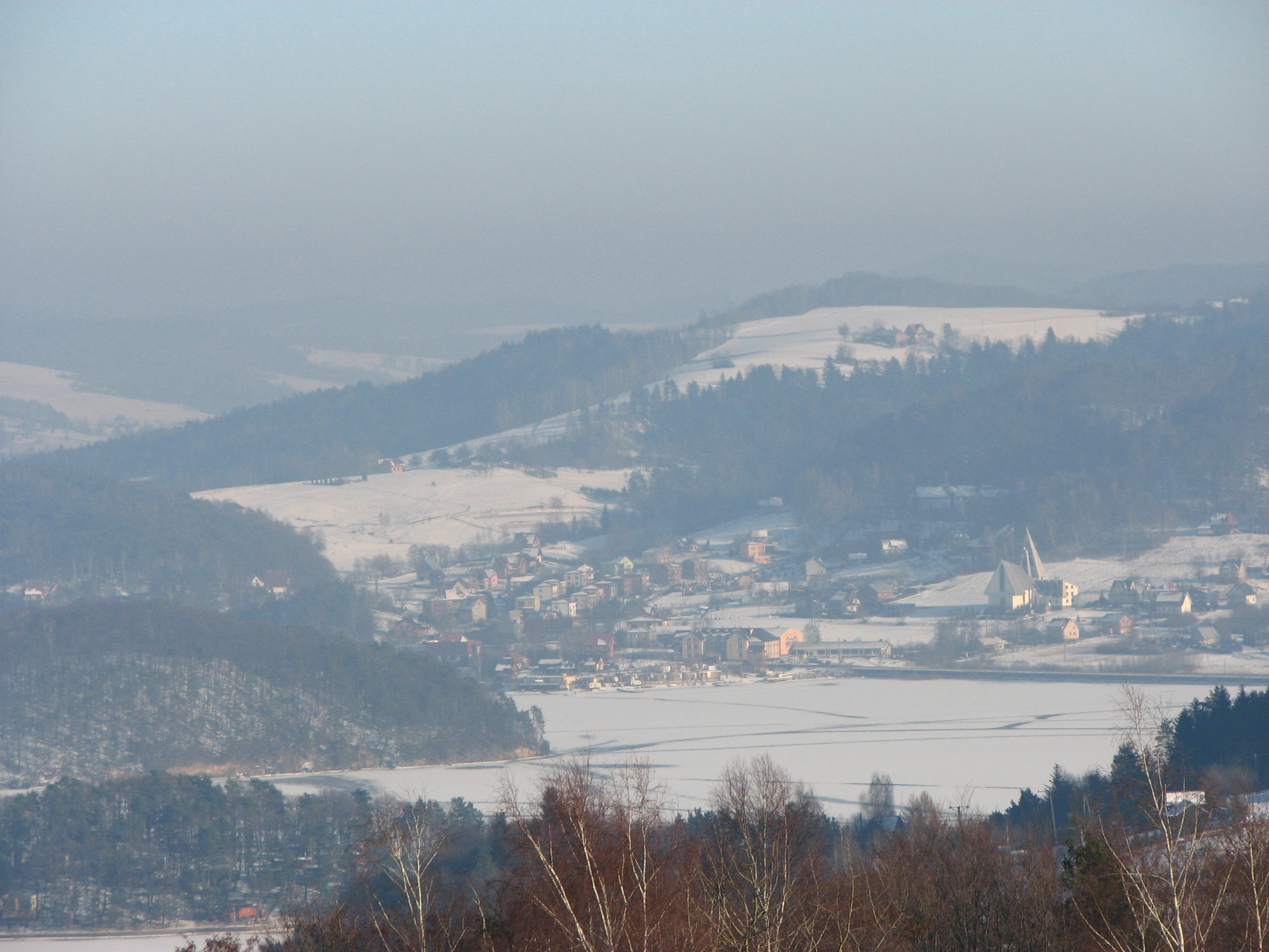 Zamarznięte Jezioro Rożnowskie. Widok z Tabaszowej. Na przeciwnym brzegu - wieś Gródek nad Dunajcem.